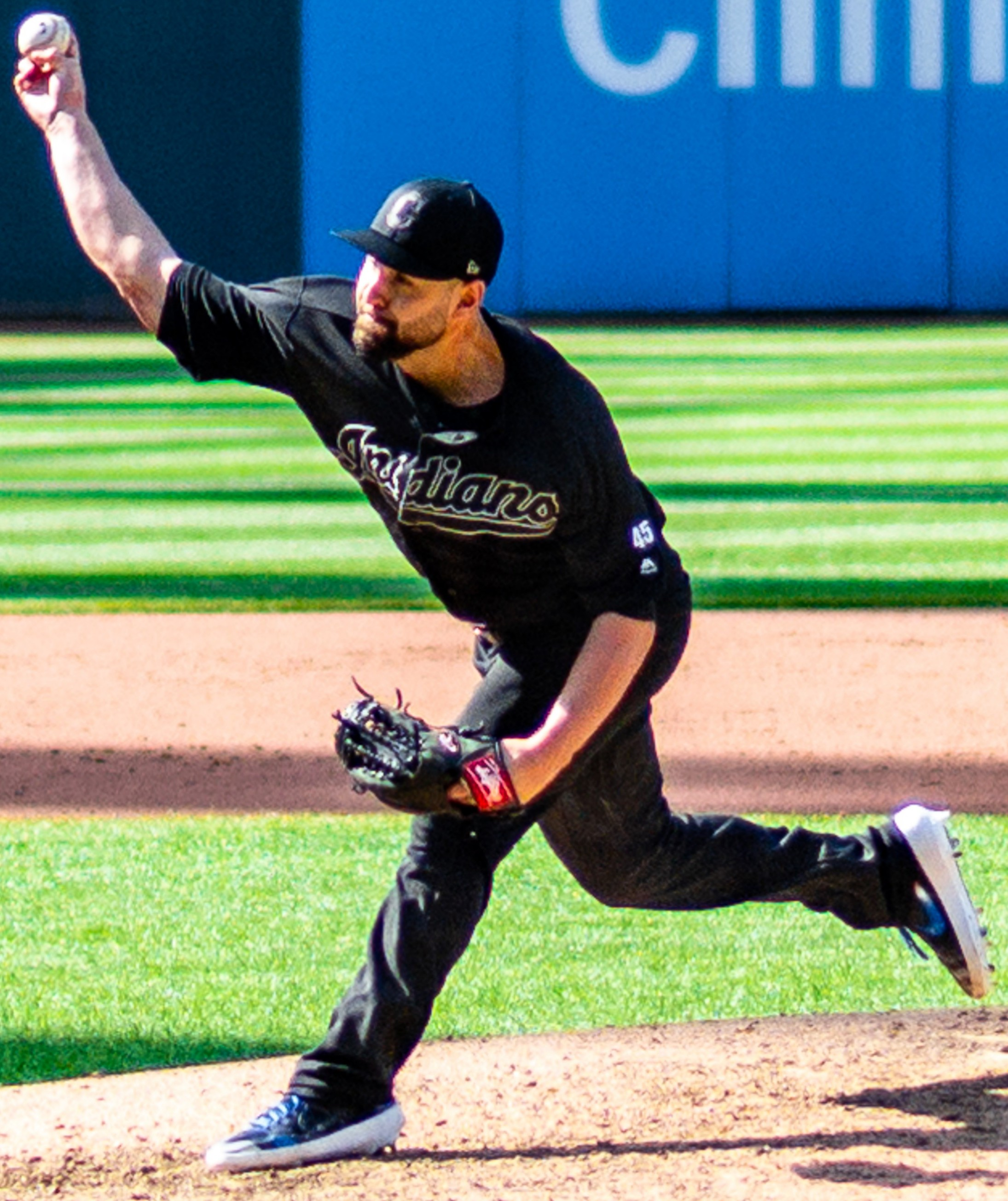 Kansas City Royals VS. Cleveland Indians